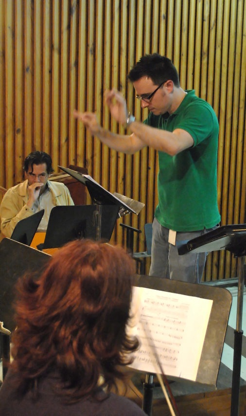 Antonio Gervasoni dirigiendo un ensamble de músicos para un concierto de su música realizado en el Auditorio del Colegio Santa María Marianistas.